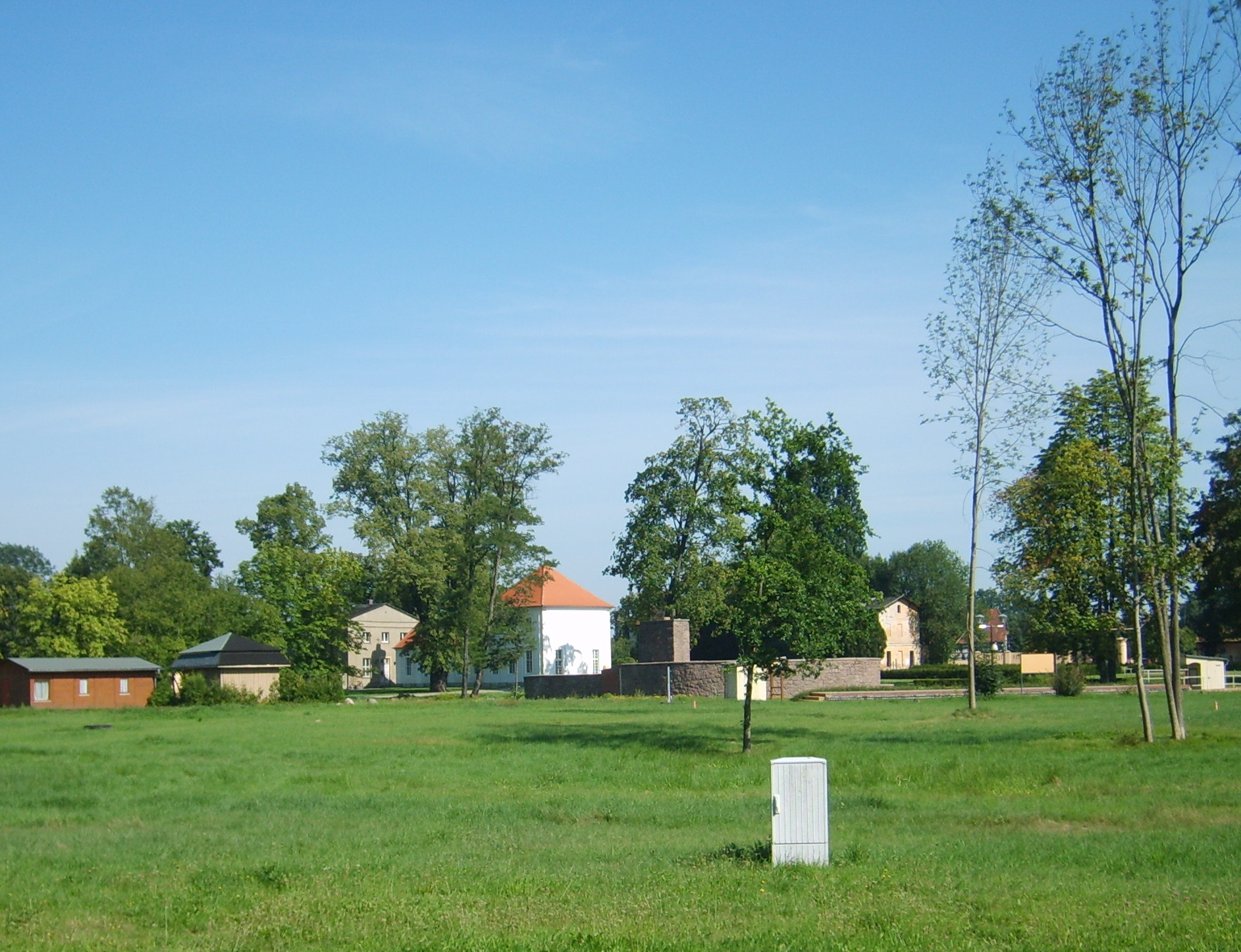 Schlosspark Lauchhammer-West